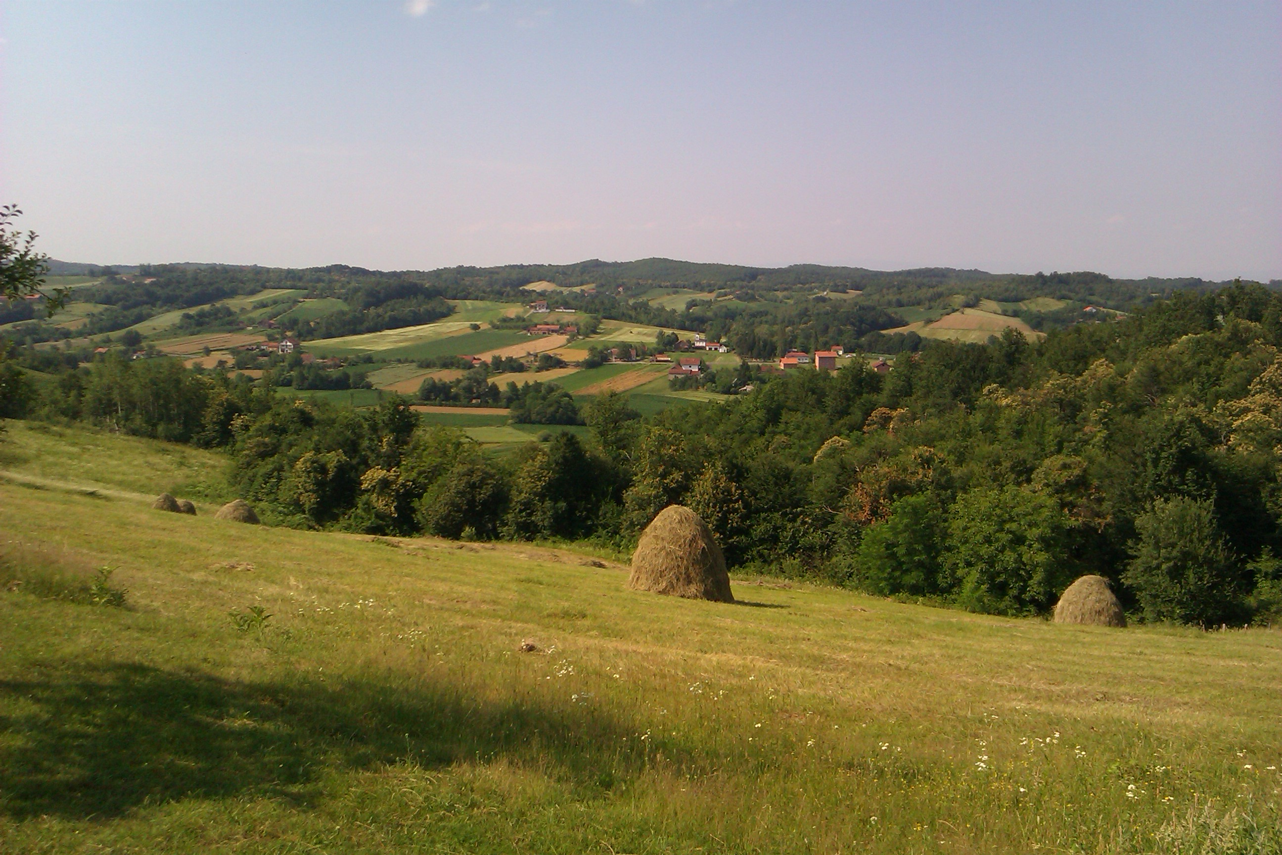 Bakinci